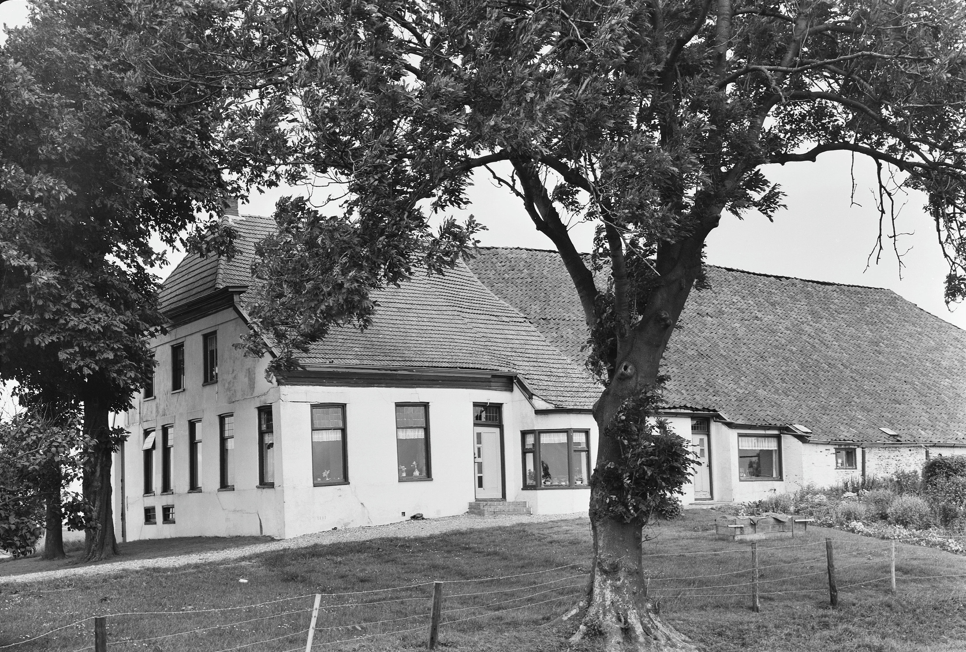 Diversen: Boerderij, aanzicht